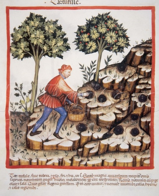 Tacuina sanitatis XIVe siècle Terra tufide tubera Tuber melanosporum